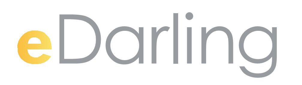 Logo online seznamky eDarling.cz